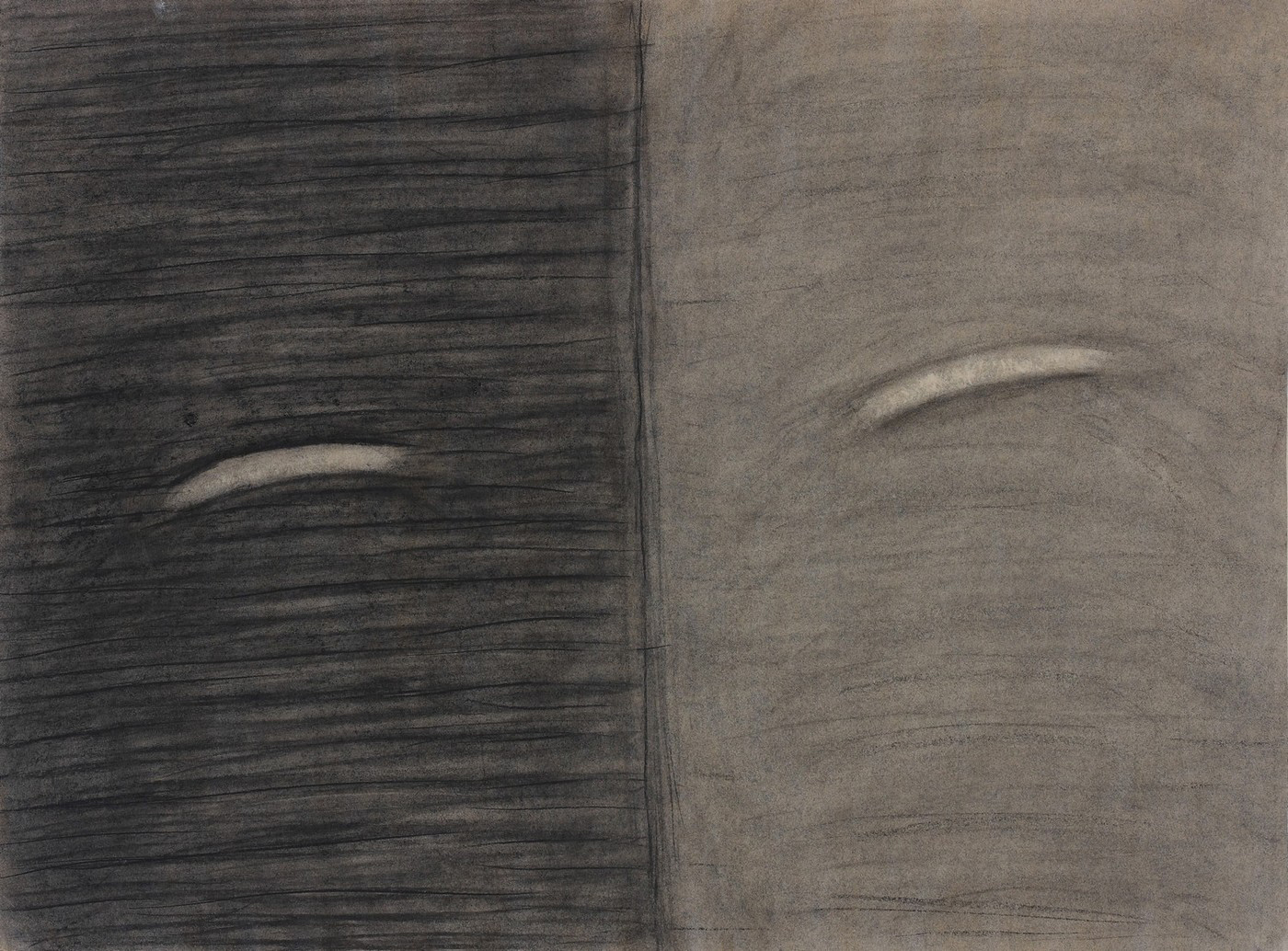 Anežka Kovalová, Vznášení, 1997